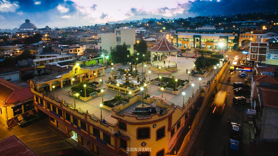 Ciudad San Marcos, Guatemala